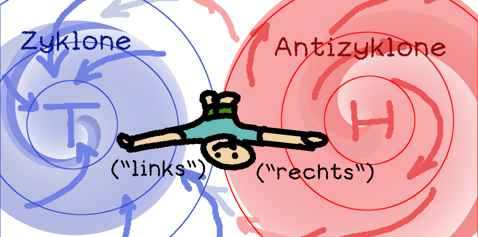 Windrichtungen in Tief- und Hochdruckgebiet. Erstellt nach Braumoeller73 ( - da in dieser Aufsicht vermutlich einfacher zu verstehen (vorige Version steht 'auf dem Kopf').